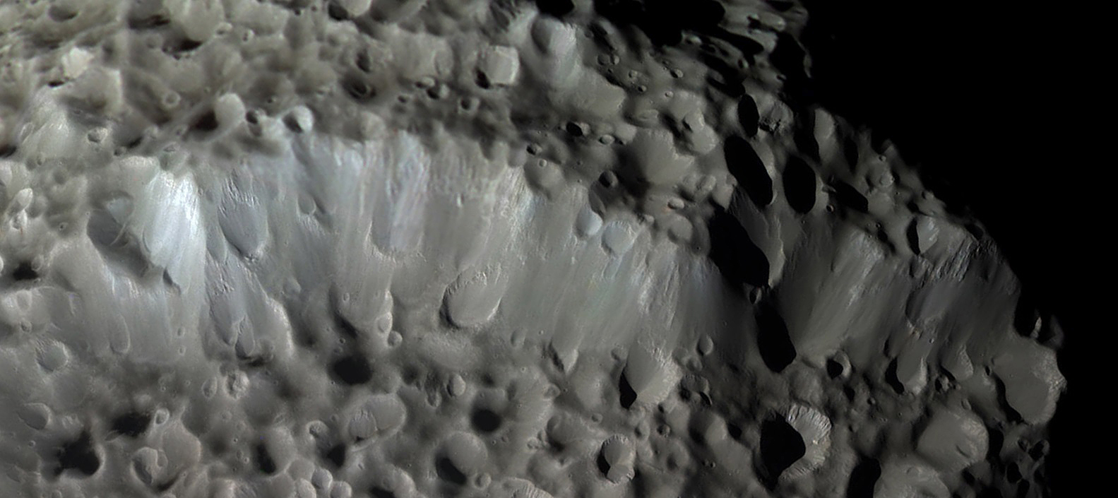 Гряда Бонд-Лассела на Гиперионе, спутнике Сатутрна